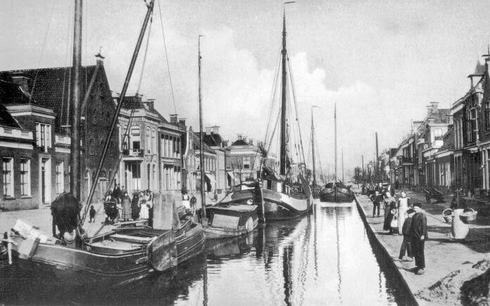 De Drachtstervaart voor WOII, met dank aan mevr. R. Spanjaard-Visser van